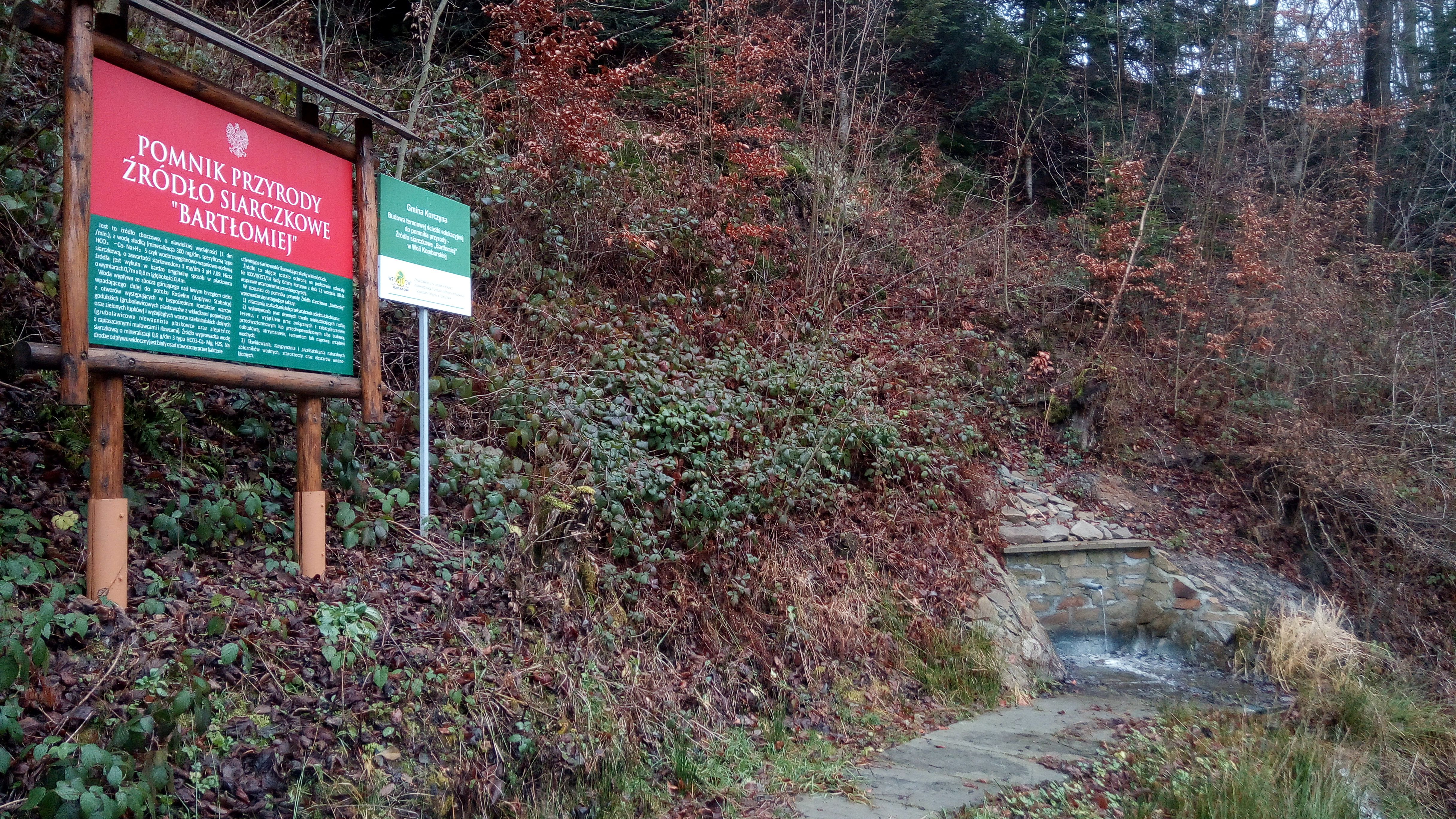 Pomnik Przyrody Źródło Siarczkowe (mineralne) Bartłomiej w Woli Komborskiej.